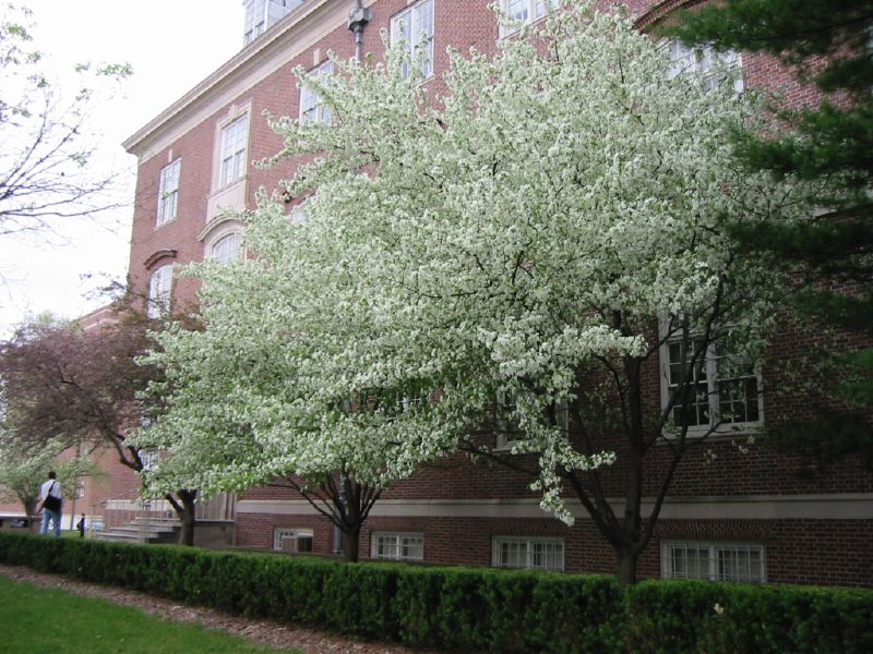 Wohlers Hall